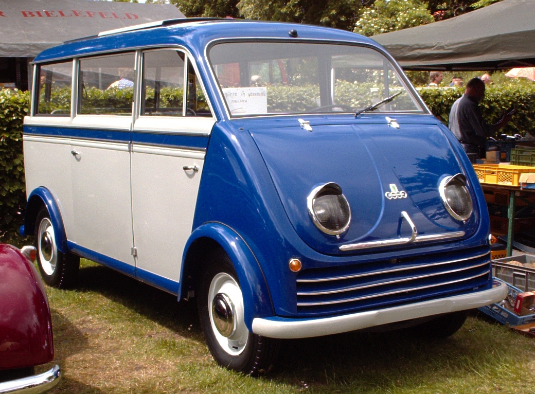 DKW-Schnellaster Bus F89L, selbst fotografiert